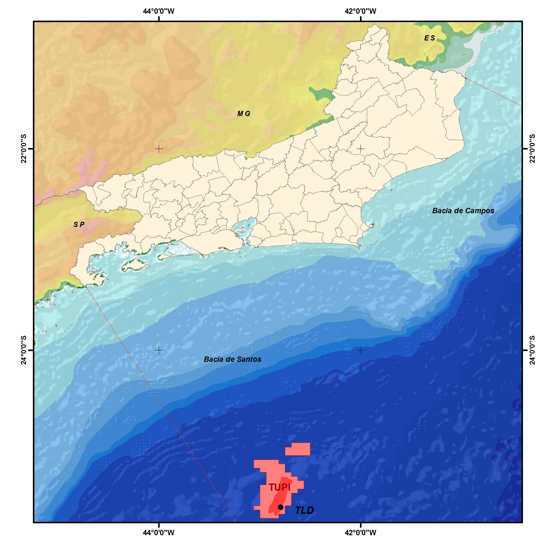 Mapa de localização de TUPI